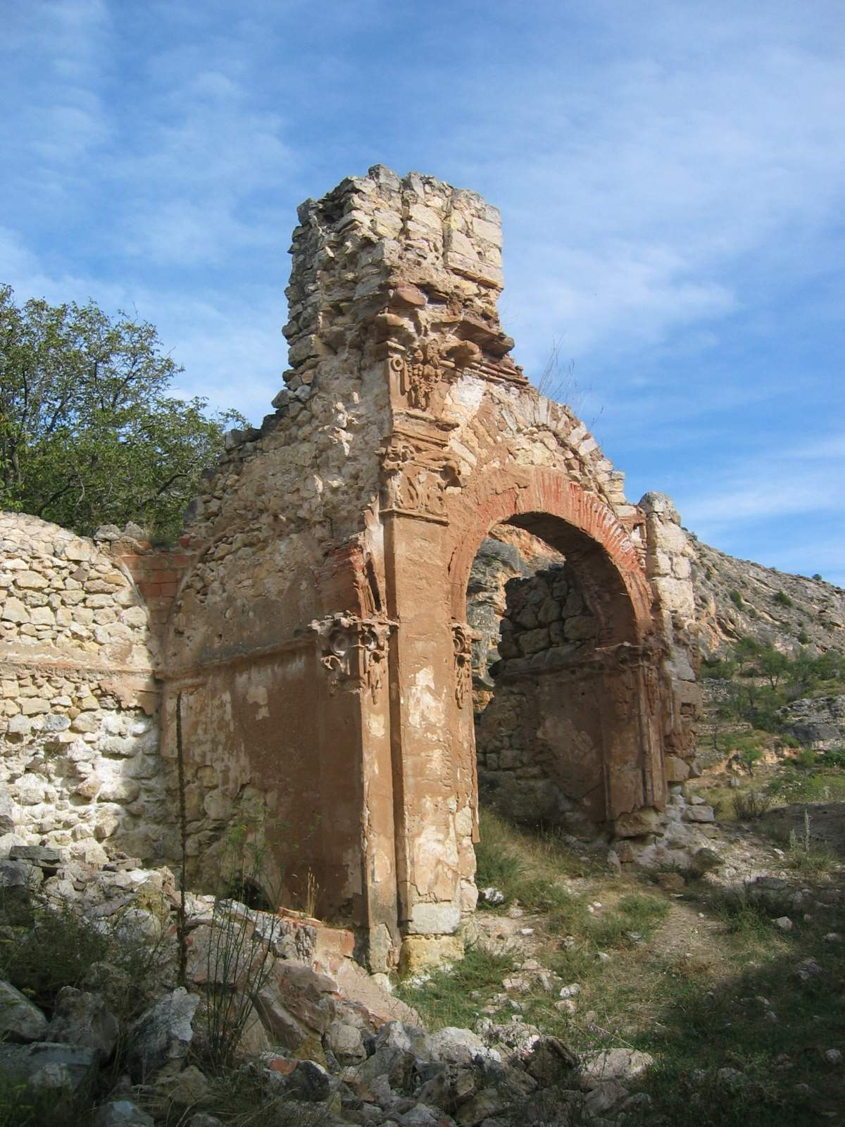 Detalle de las ruinas de la iglesia del Convento de San Guillermo, Castielfabib (Valencia).